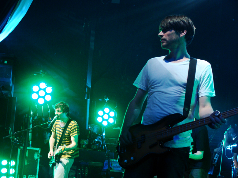 Blur